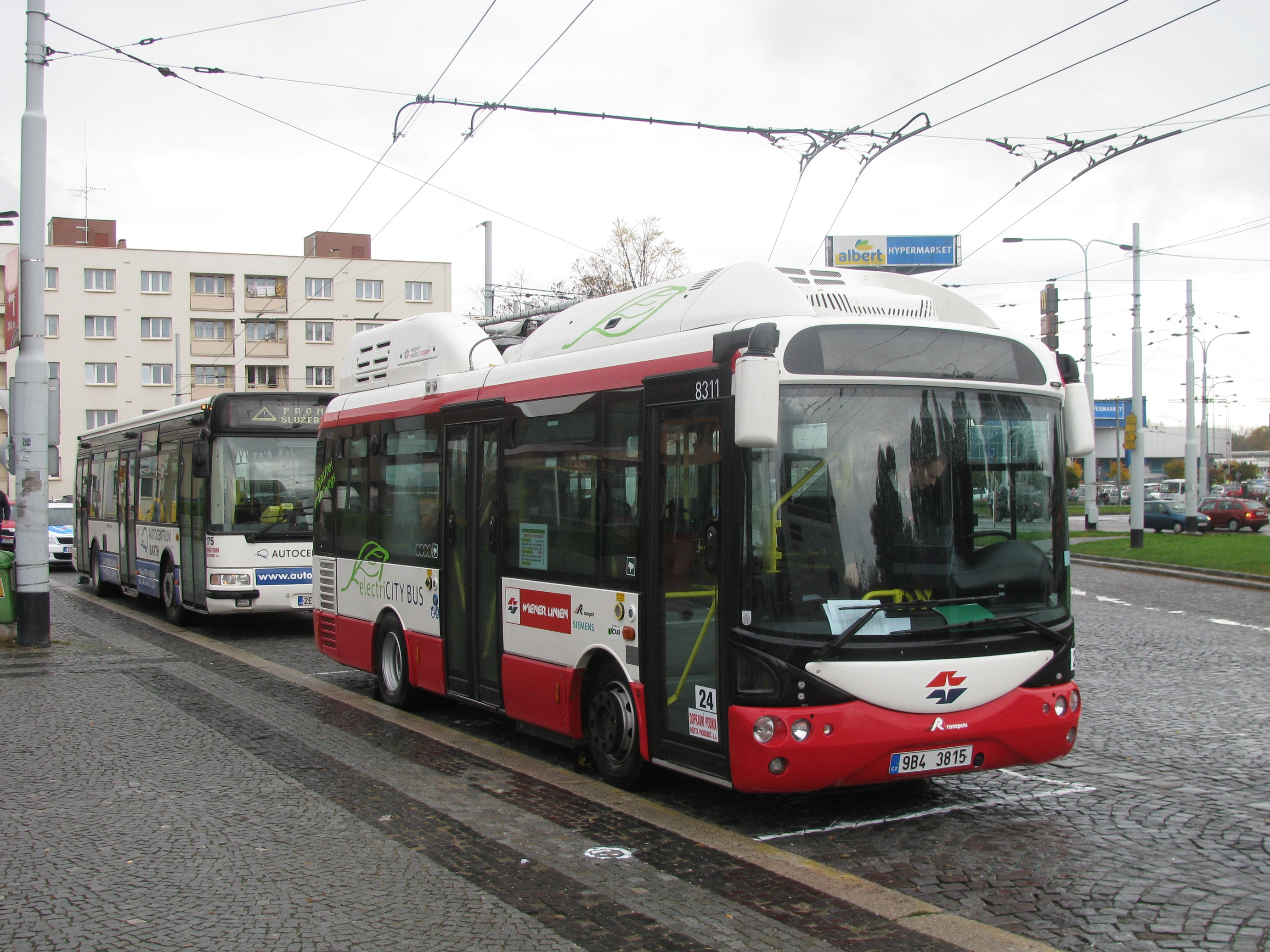 Elektrobus Rampini-Siemens v barvách Wiener Linien a s brněnskou registrační značkou při předvádění s cestujícími v Pardubicích v zast. Hlavní nádraží